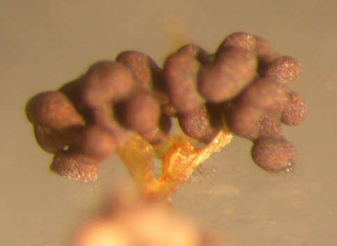 変形菌Physarum polycephalumの子実体 投稿者が2003年6月に培養したものを撮影